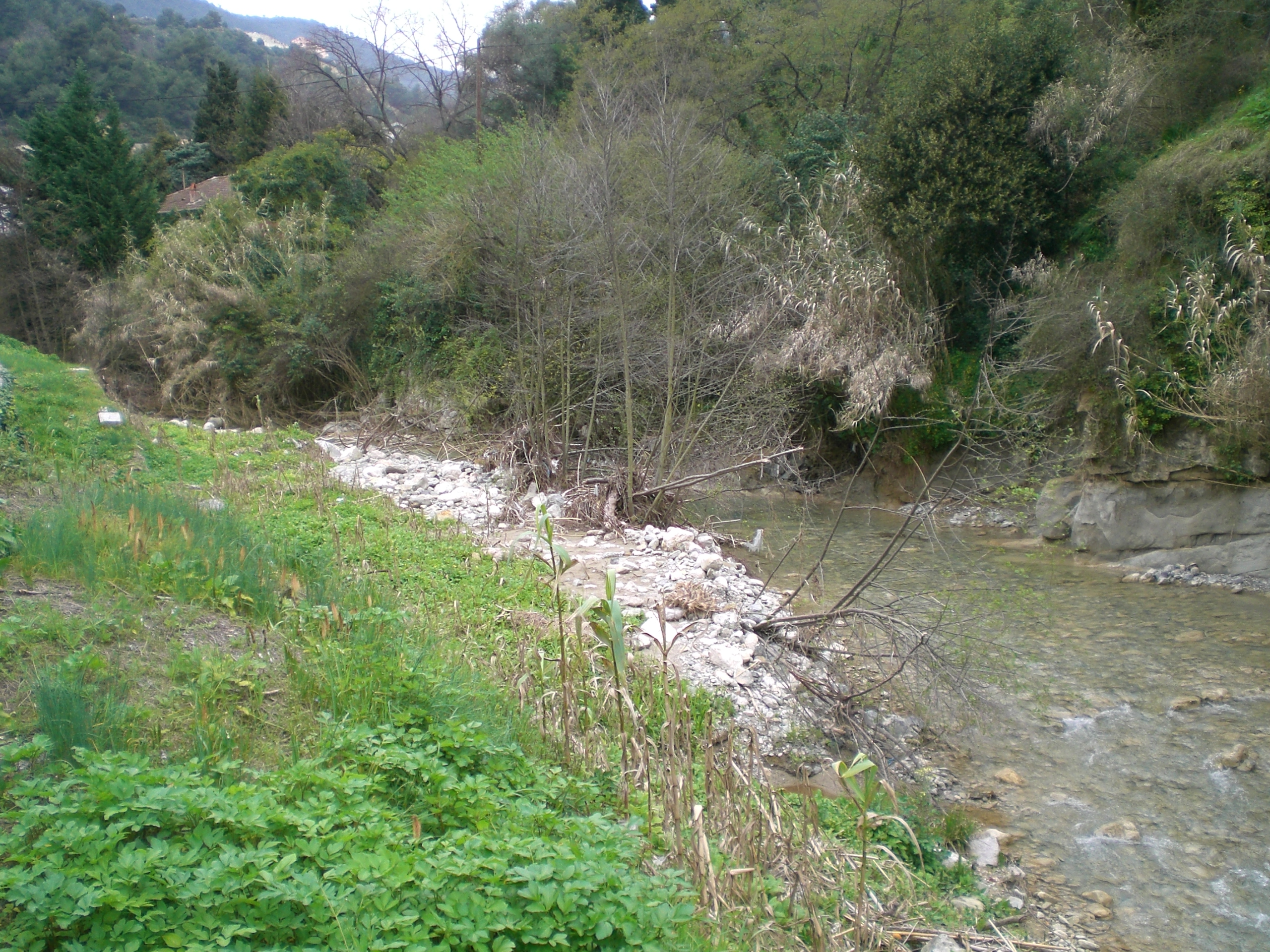 Careï à Menton